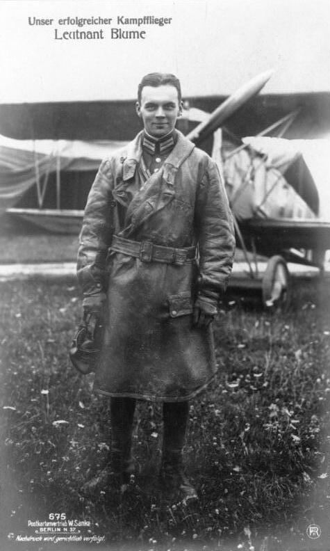 Unser erfolgreicher Kampfflieger Leutnant Blume